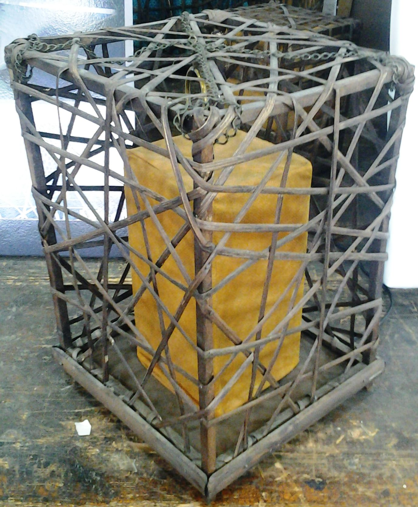 وحدات إضاءة متعددة الأشكال.